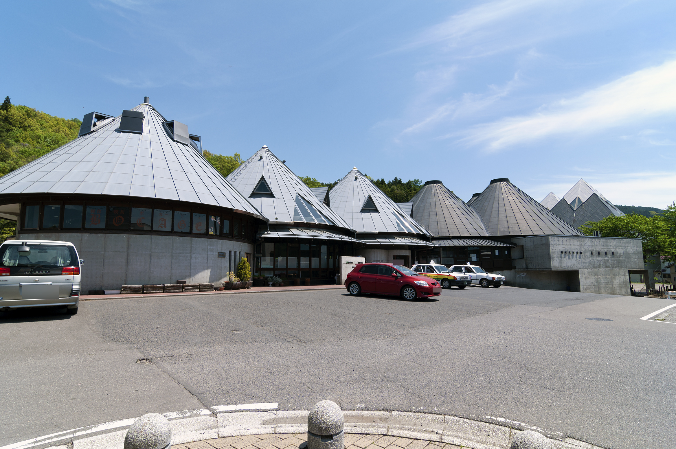 東日本旅客鉄道株式会社水郡線磐城塙駅全景